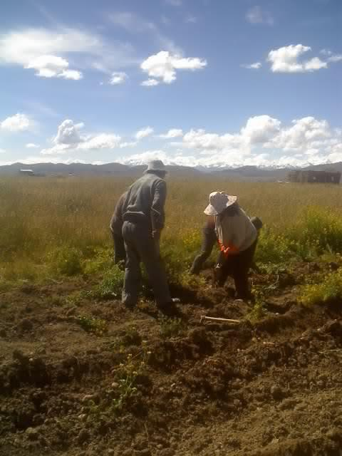 Cosecha ayni, mink´a